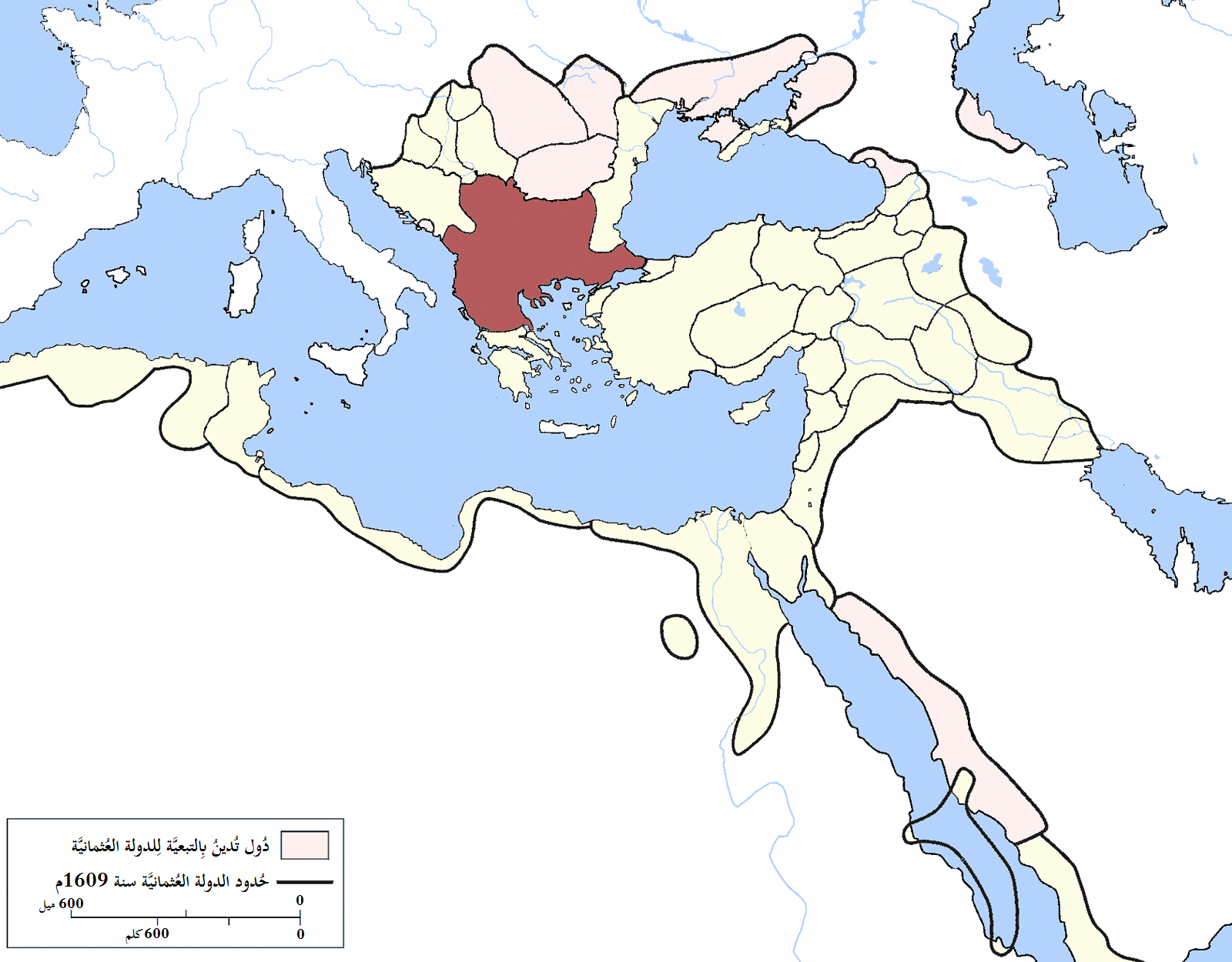 خريطة إيالة الروملِّي في الدولة العُثمانيَّة سنة 1609م.